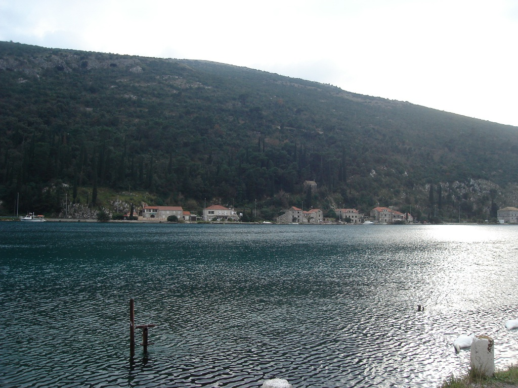 Village Čajkovići near Dubrovnik